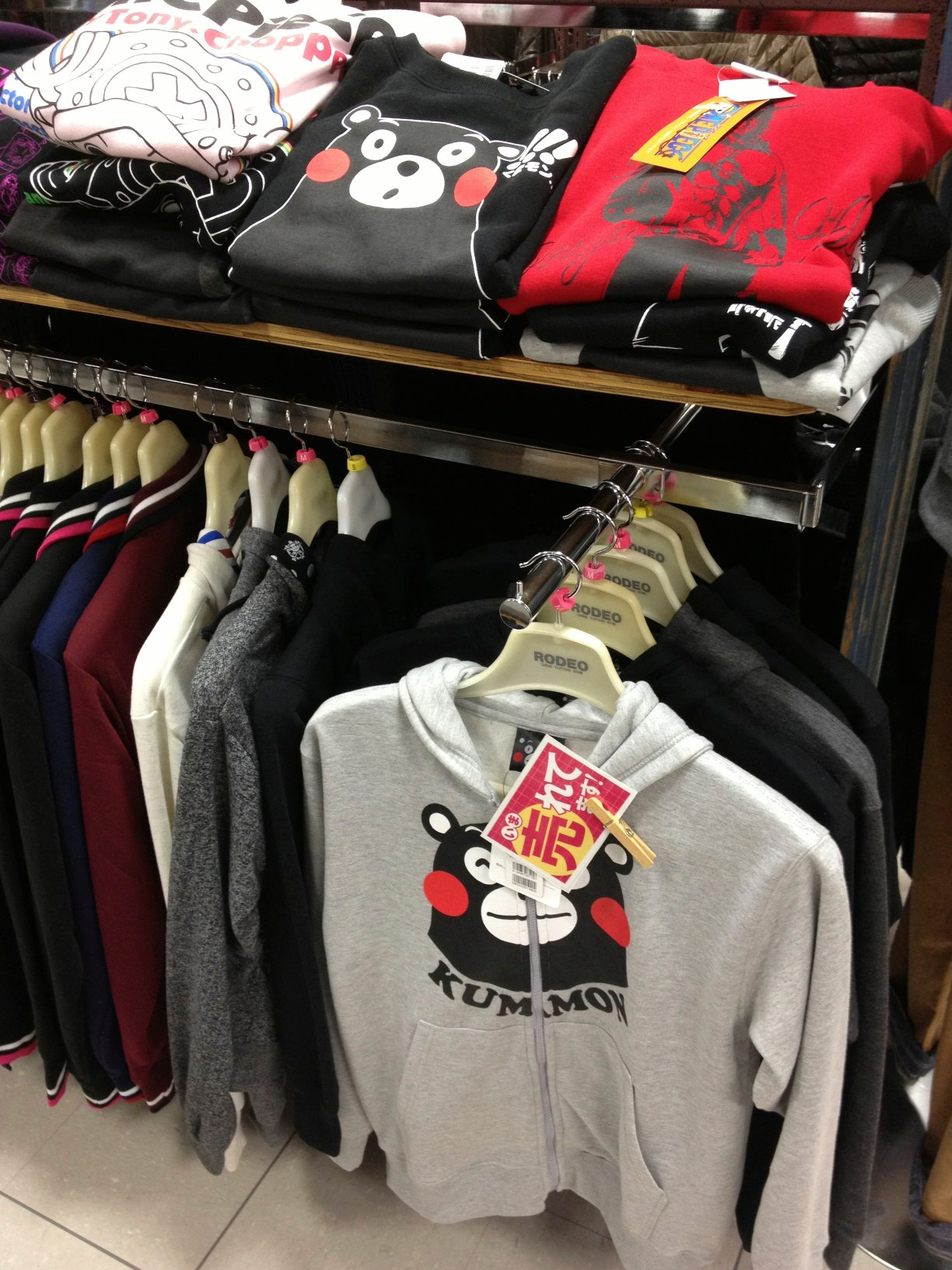 くまモン＠山口県